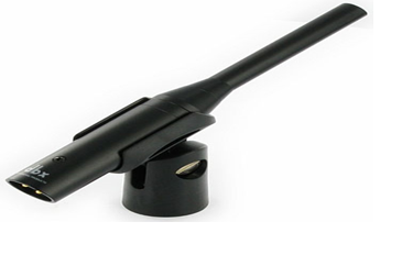 Micro